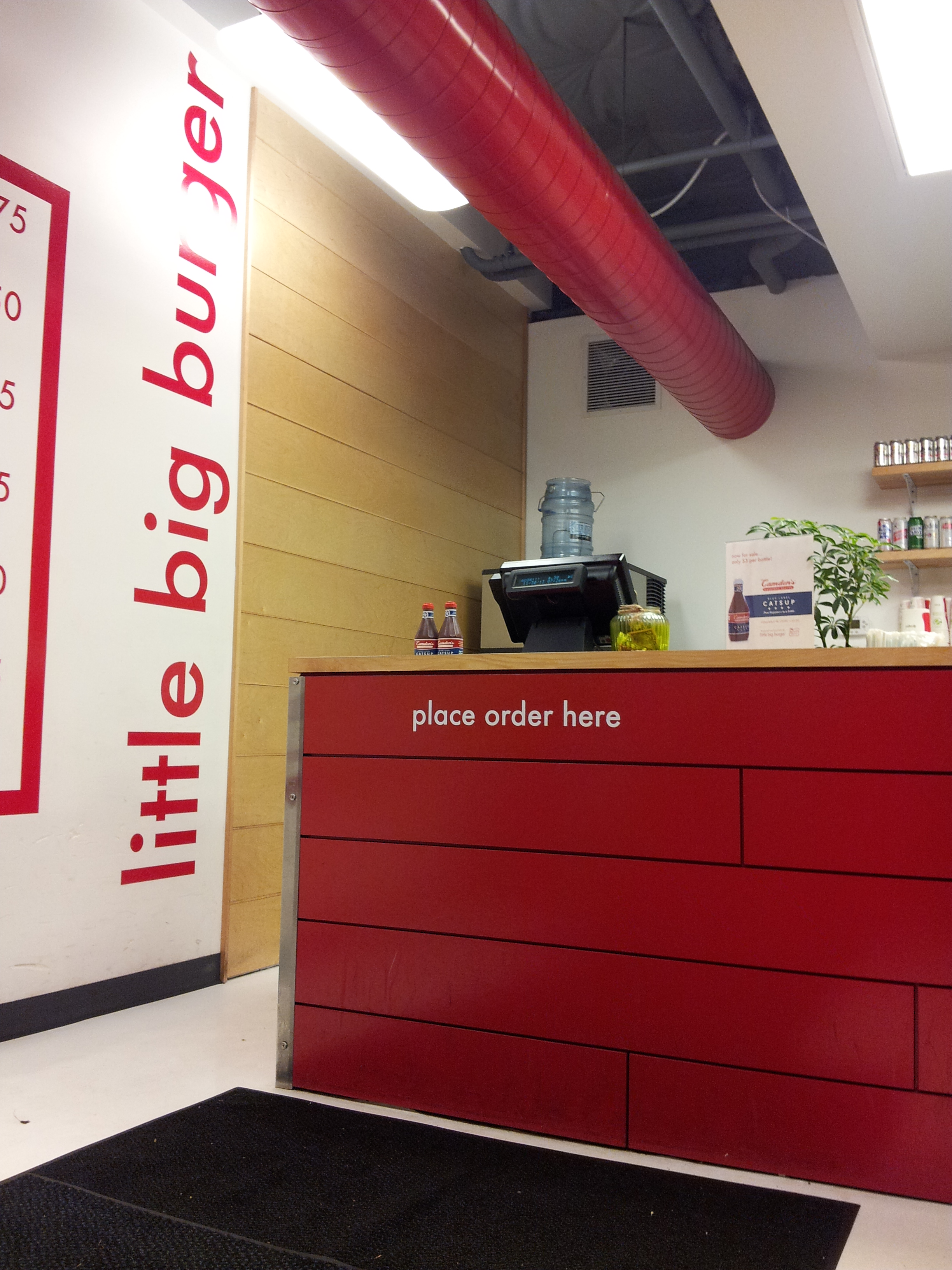 Little Big Burger, SE Divison, Portland, OR (2013)